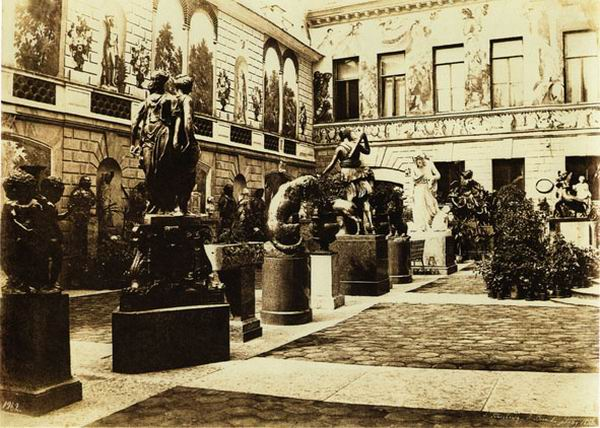 Петербург